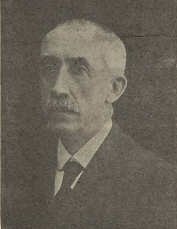 Político tradicionalista